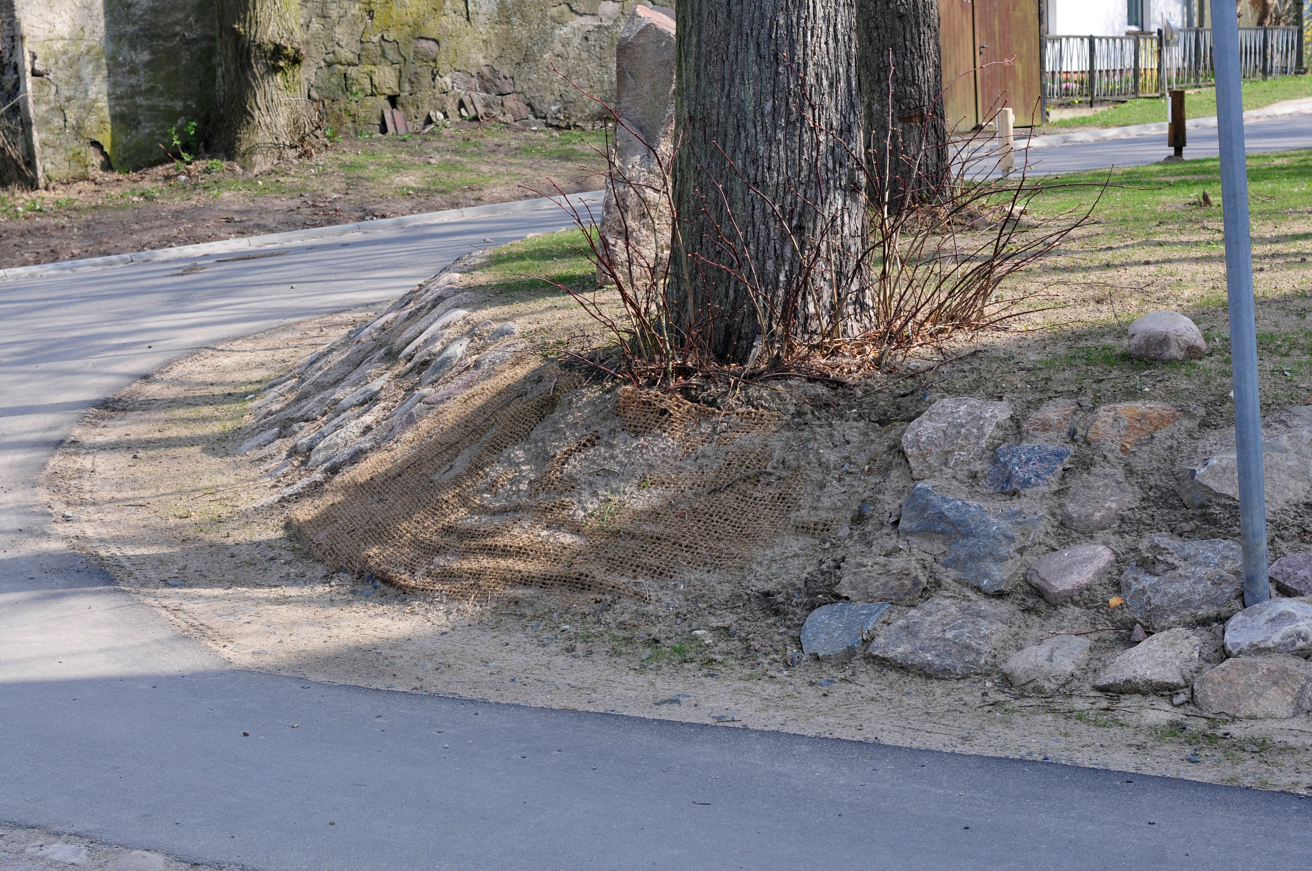 Senftenhütte Kreis Barnim